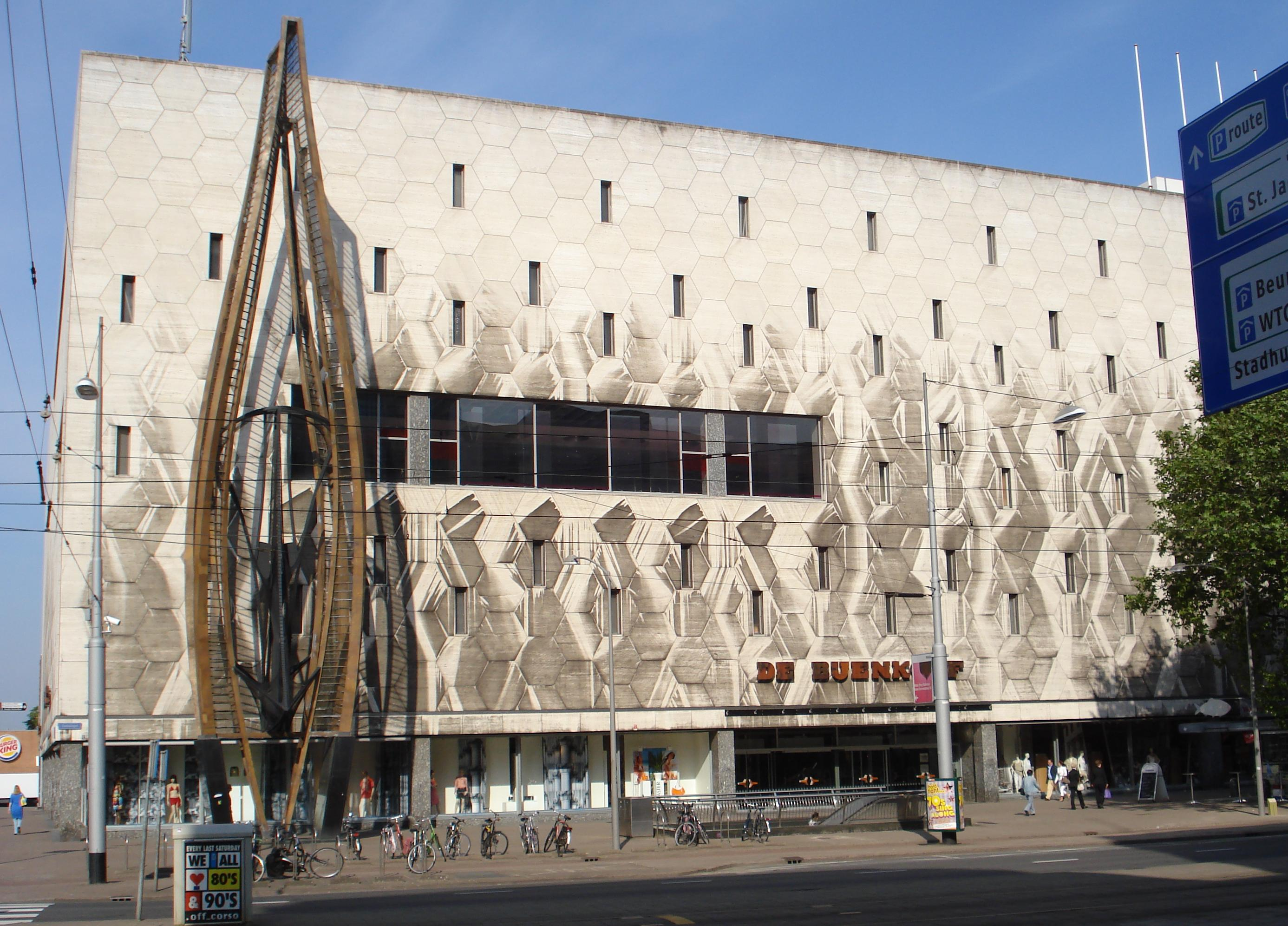 Rotterdam, Coolsingel: de Bijenkorf. Voorgedragen als rijksmonument, oktober 2007.